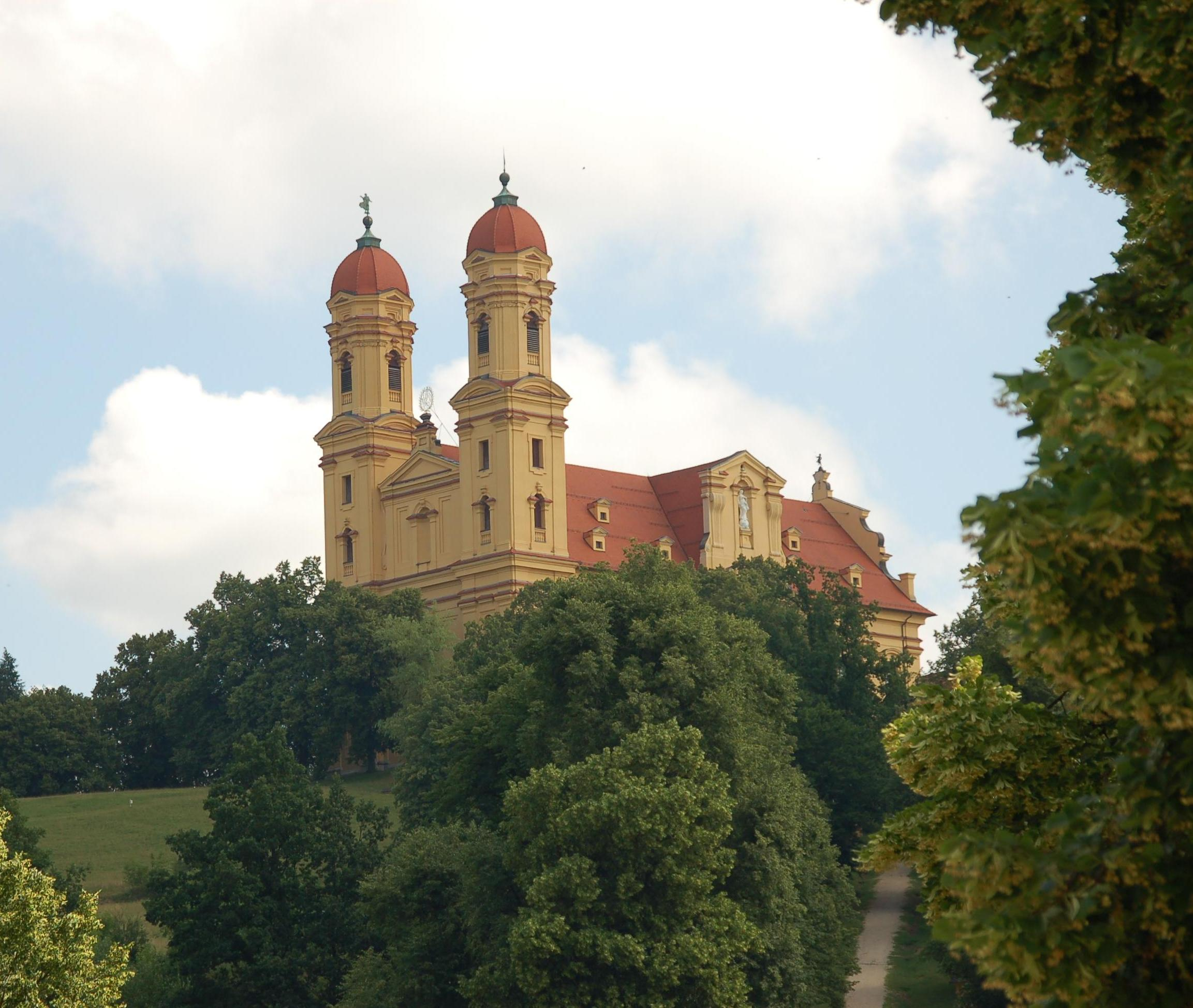 Blick auf die Türme der Westseite der Schönenberg Kirche in Ellwangen.